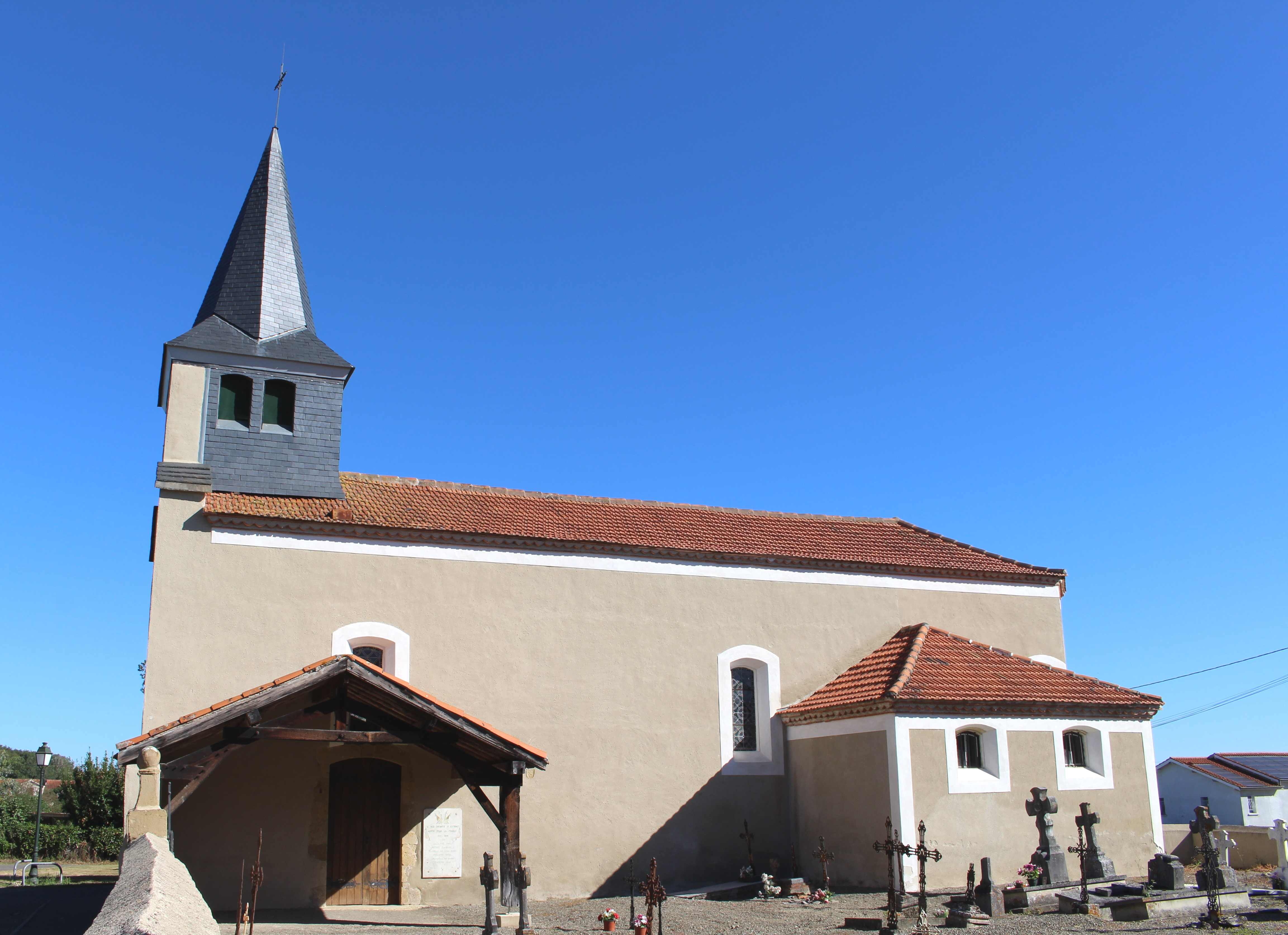 Église Saint-Jean-Baptiste d'Estirac (Hautes-Pyrénées)